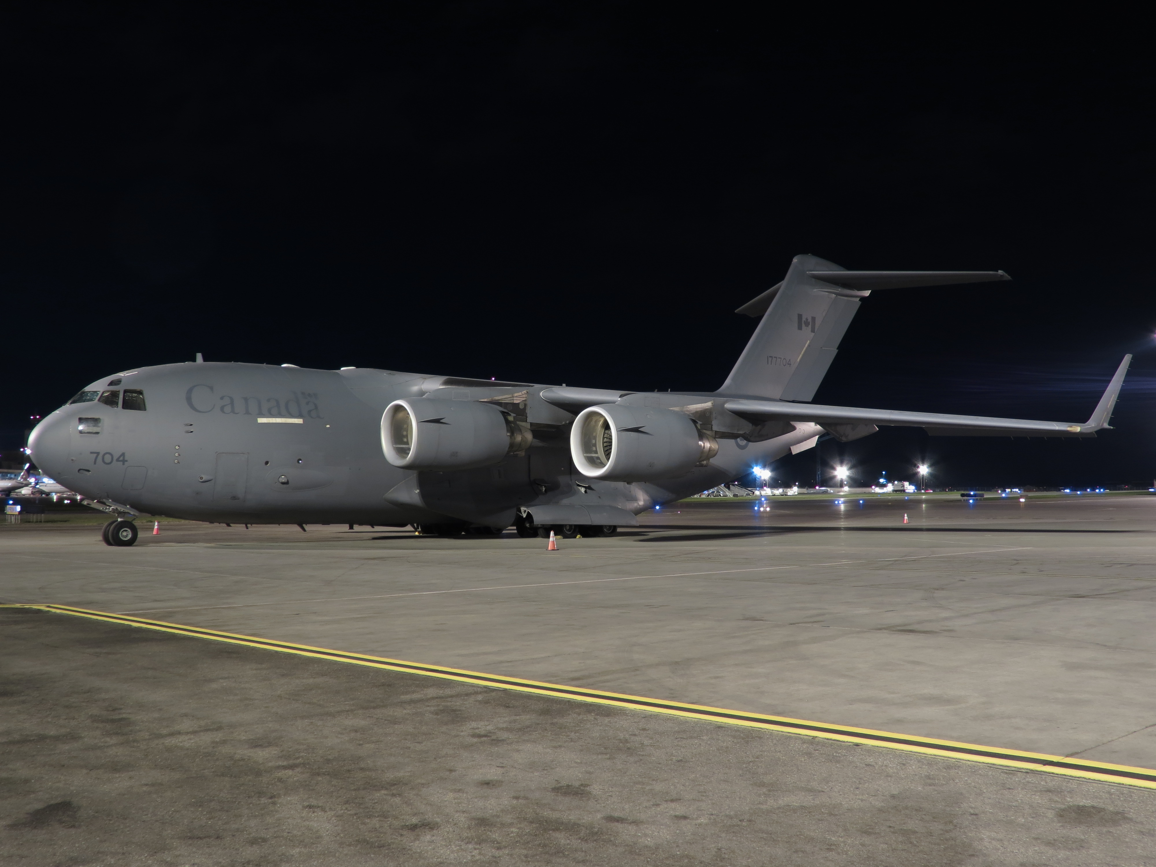 RCAF Boeing C-17 CC177704